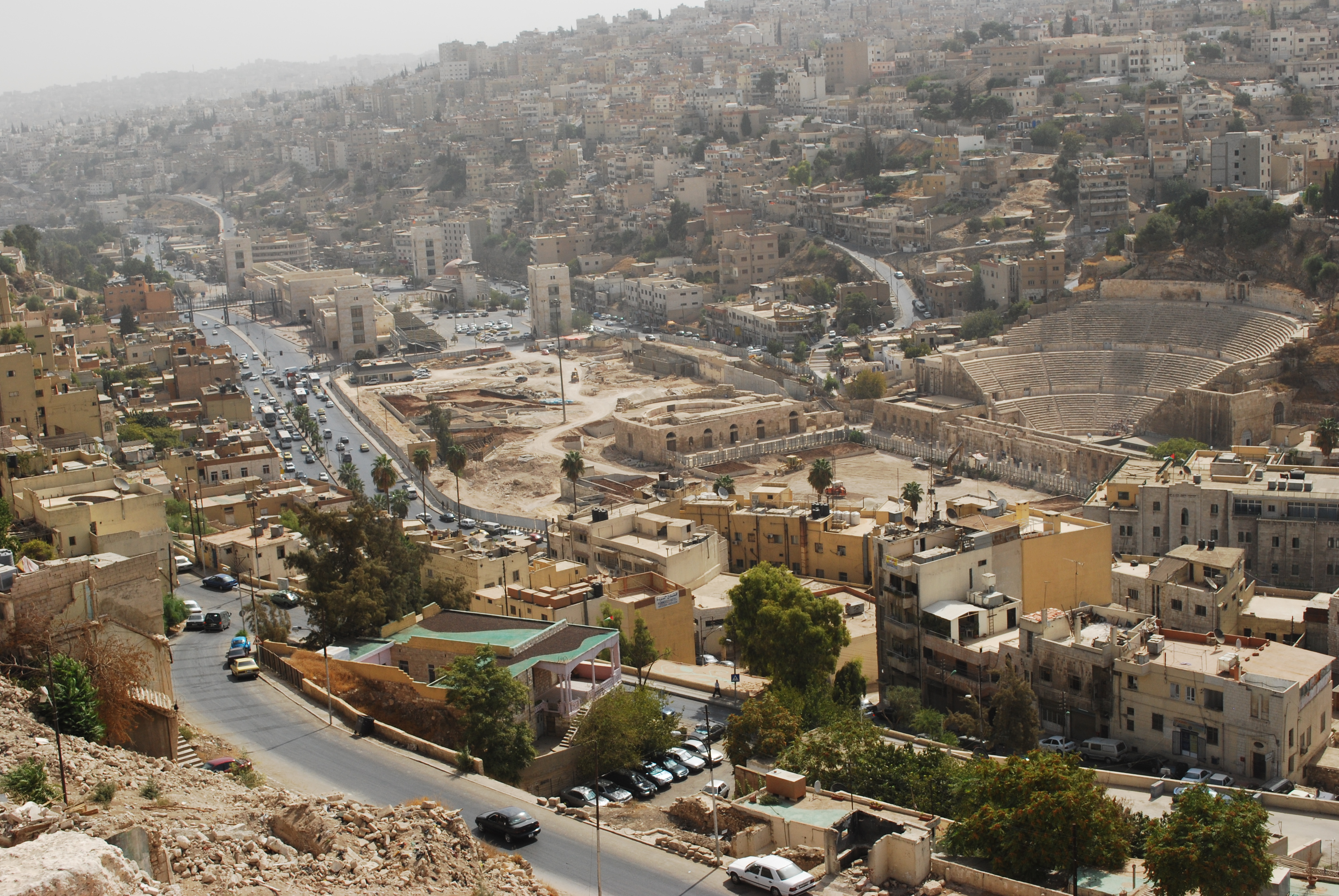 Citadelle d'Amman : vue panoramique vers l'Est, les rues au flanc de la citadelle, l'amphithéâtre romain et Al Hashimi Street.